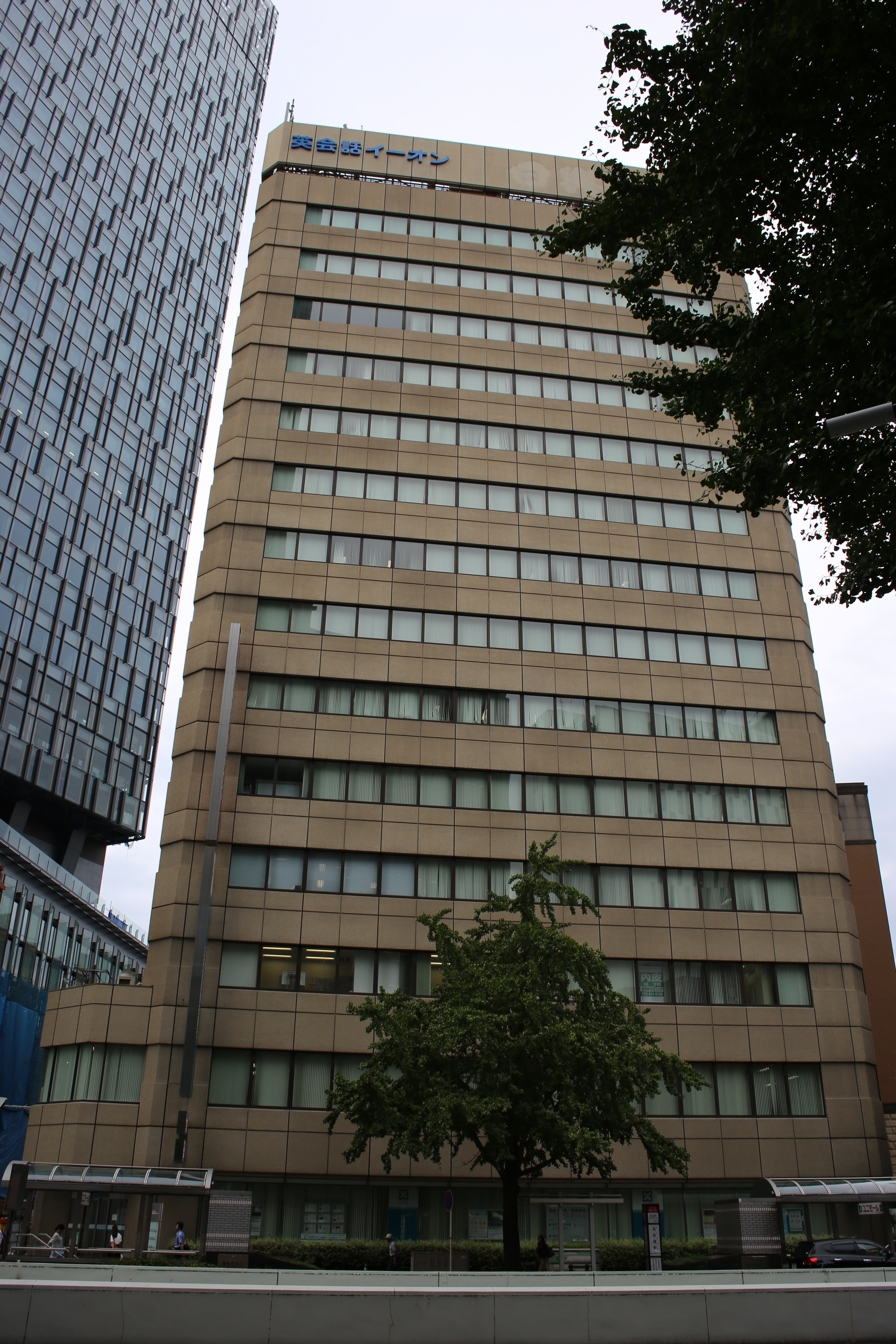 名古屋市中村区名駅三丁目のKDX名古屋駅前ビルを南側公道より撮影